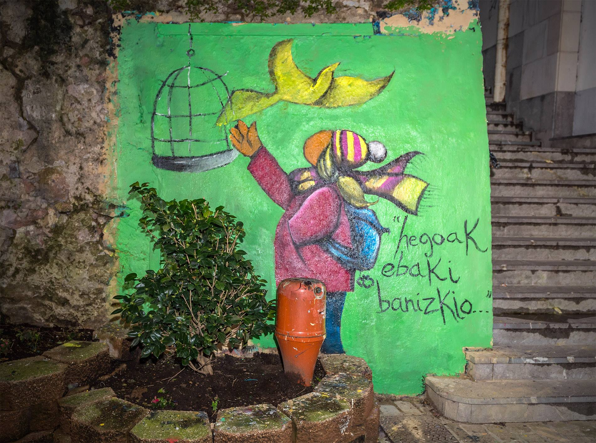 Joxan Artze gogoan. Motxiladun ume bakarrak izan daitezen hondartzan, eskolan, mendian... aurkituko ditugunak, eta ez kartzeletan.